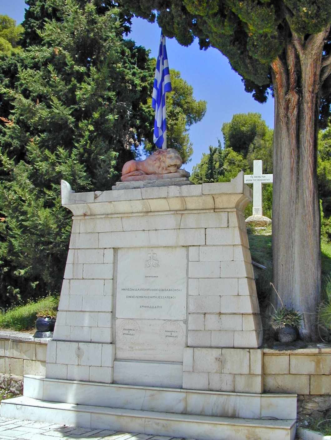 Le tumulus des Morts inconnus Jardin des Héros à Missolonghi ou Mesolongi Photo prise en 2003 par l'auteur et publiée sur un site de voyage en Grèce